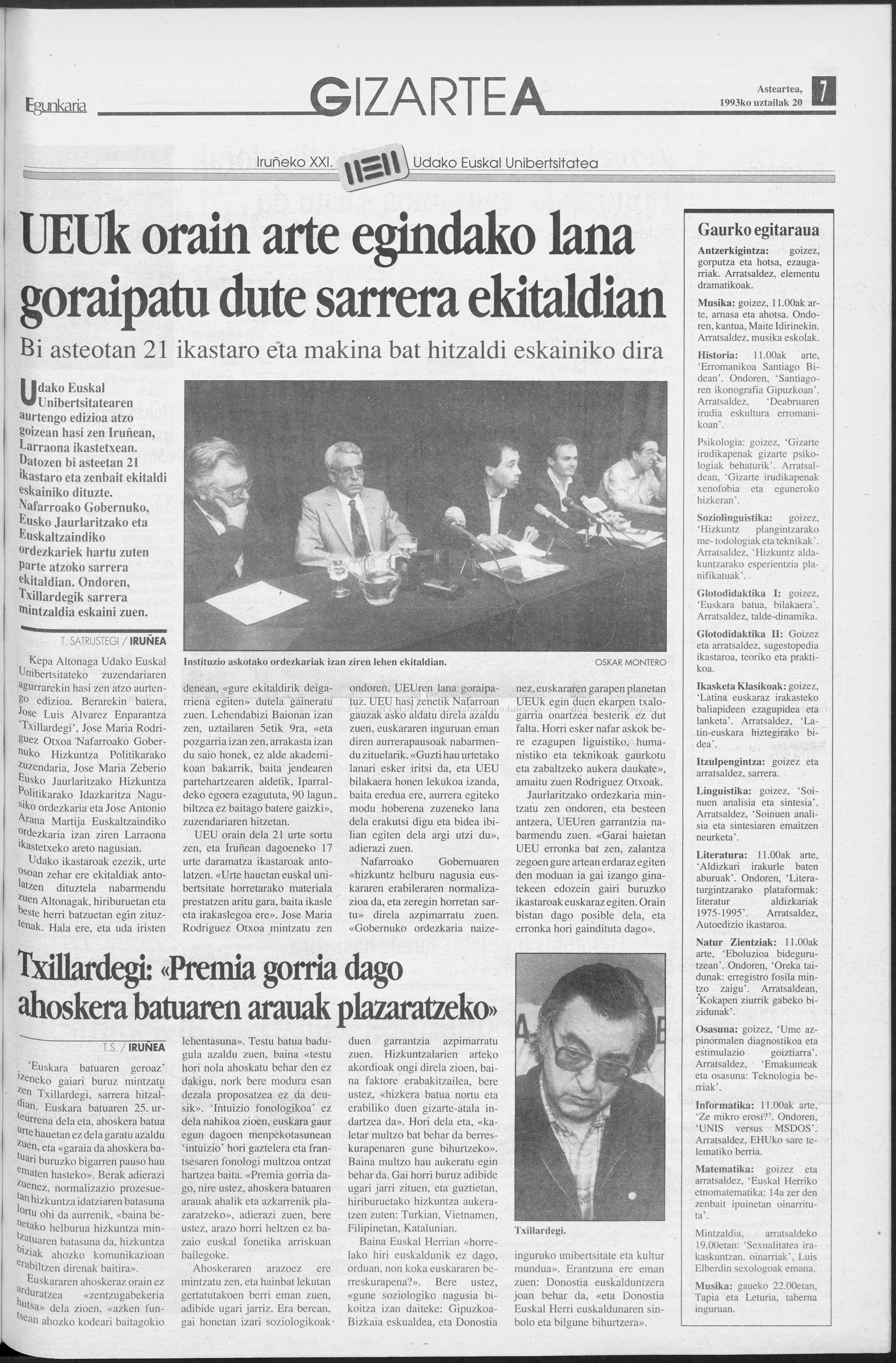 UEU93 Txillardegi sarrera-hitzaldia (Euskaldunon Egunkaria, 93-07-20)